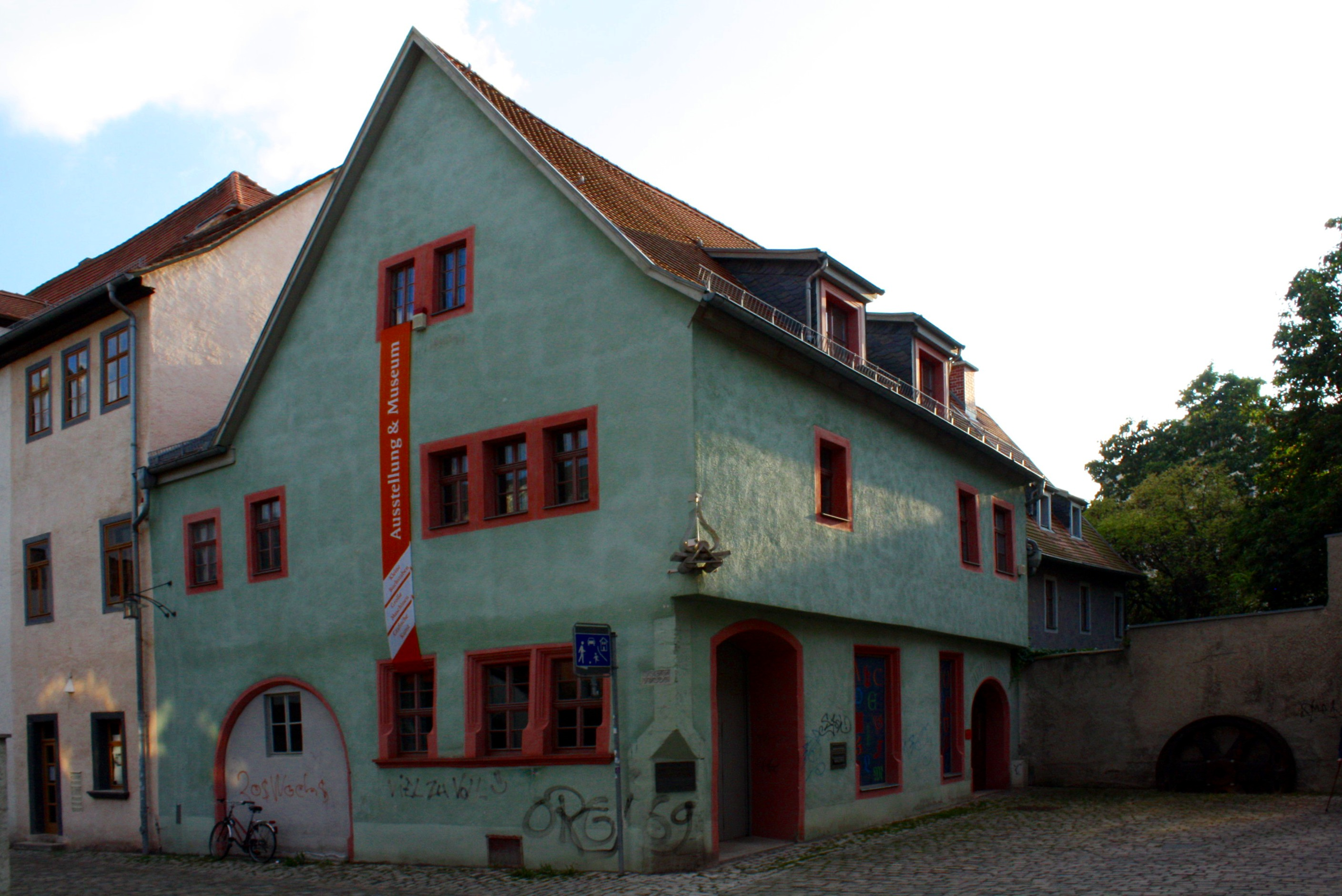 Ehemalige Druckerei in der Scherfgasse 5 in Weimar